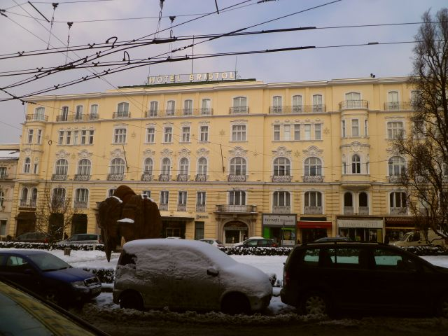 Hotel Bristol (Salzburg)